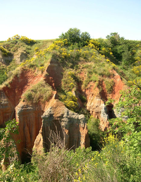 Secuencia de paleosuelos (Paleosol sequence) Tuscany, Italy